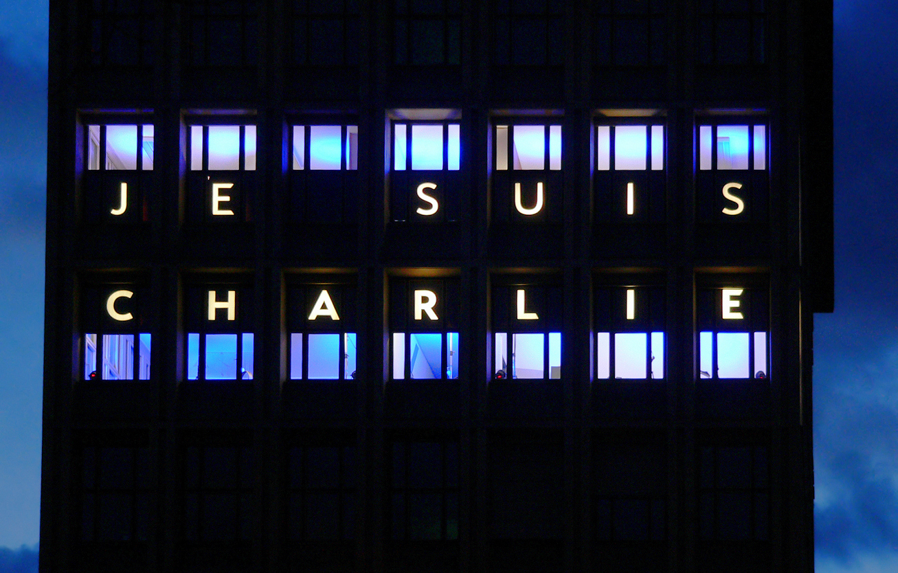 Leuchtschrift Je suis Charlie am Niedersächsischen Ministerium für Wissenschaft und Kultur